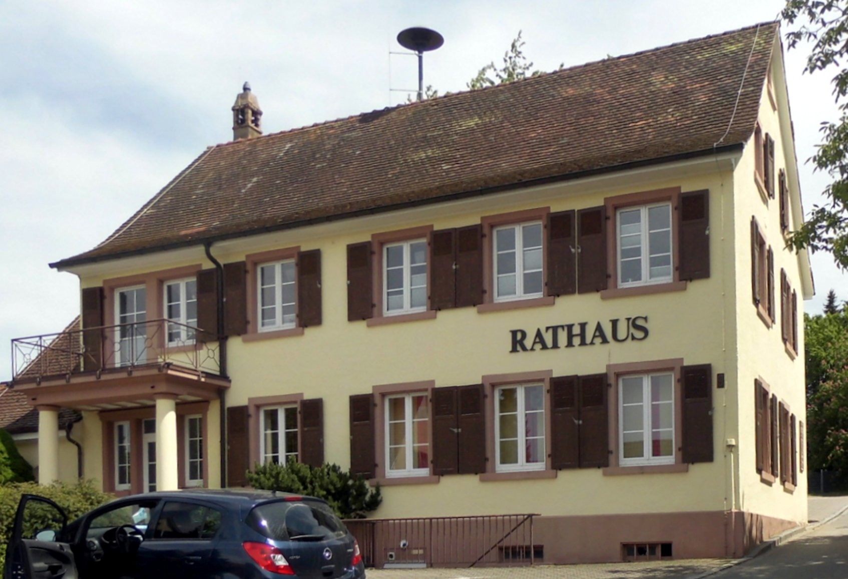 Rathaus der Gemeinde Rümmingen, Landkreis Lörrach, Baden-Württemberg